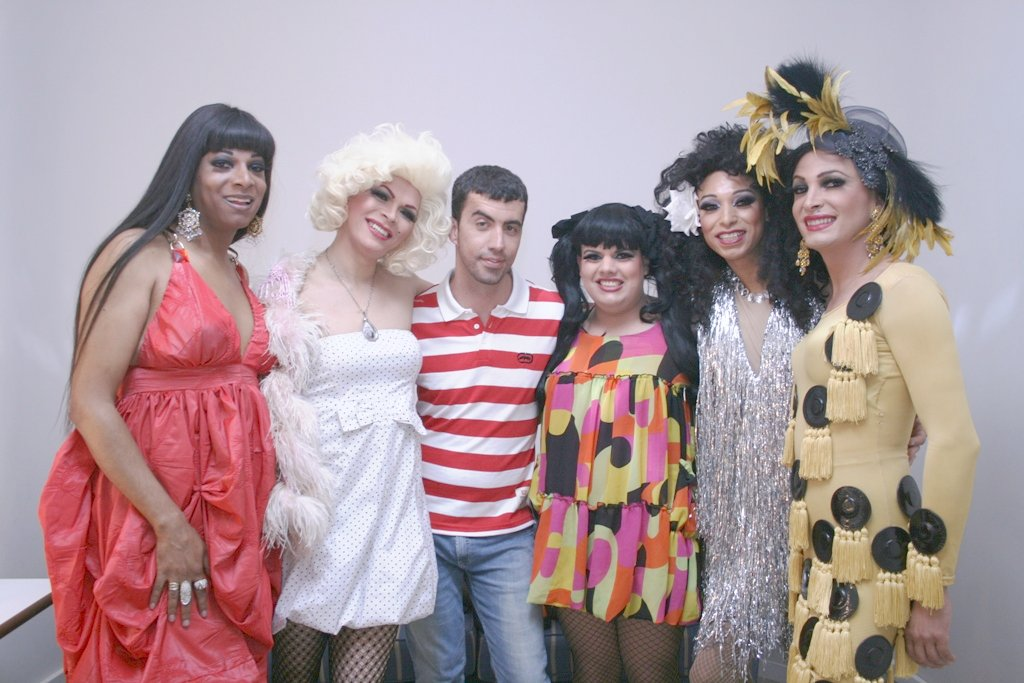 Silvetty Montilla, Salete Campari e outras drag queens brasileiras em 2009.